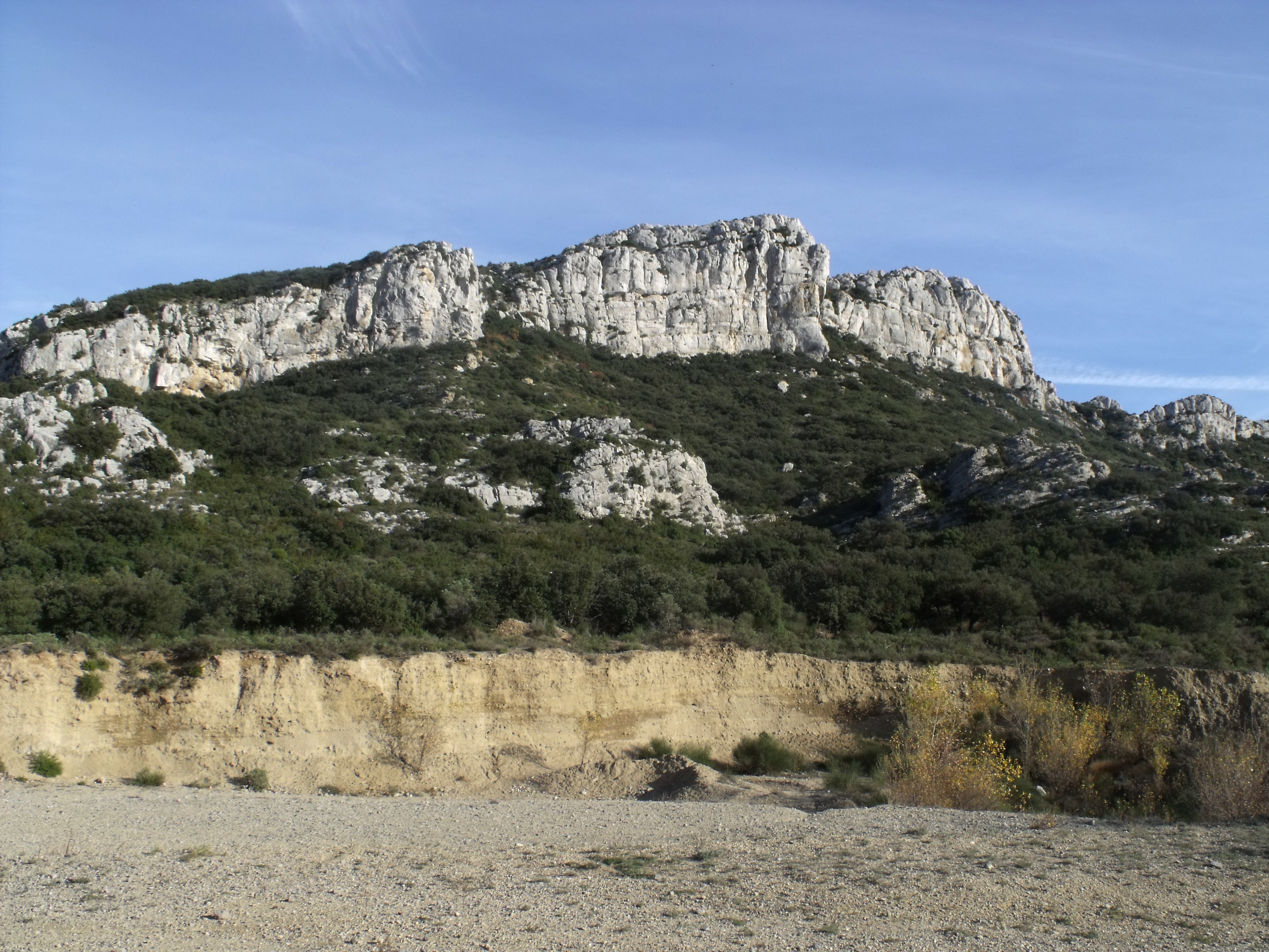 Mont Sainte-Cécile, point culminant du massif du mont Menu. Eyguières (Bouches-du-Rhône).